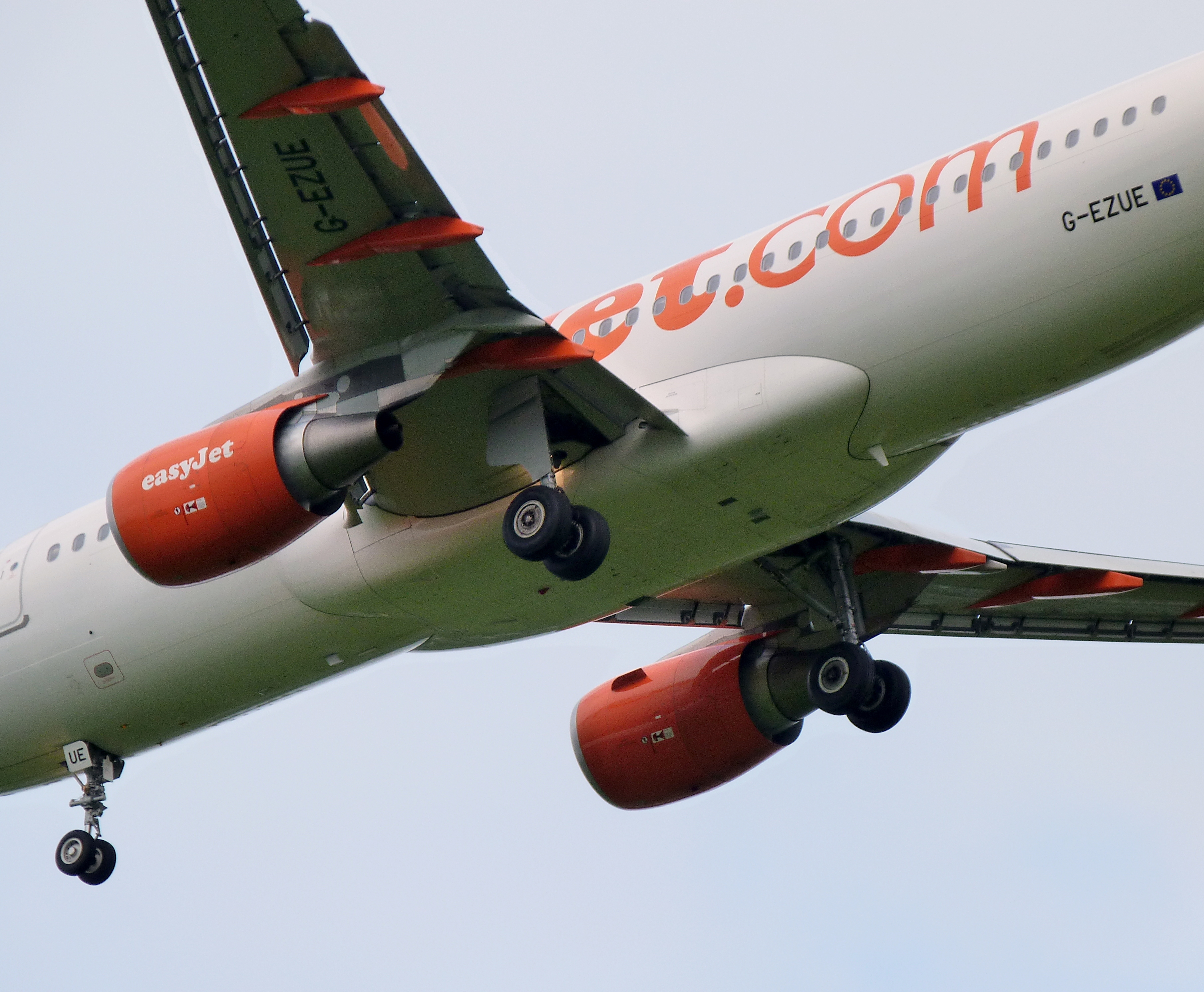 G-EZUE A.320 easyjet